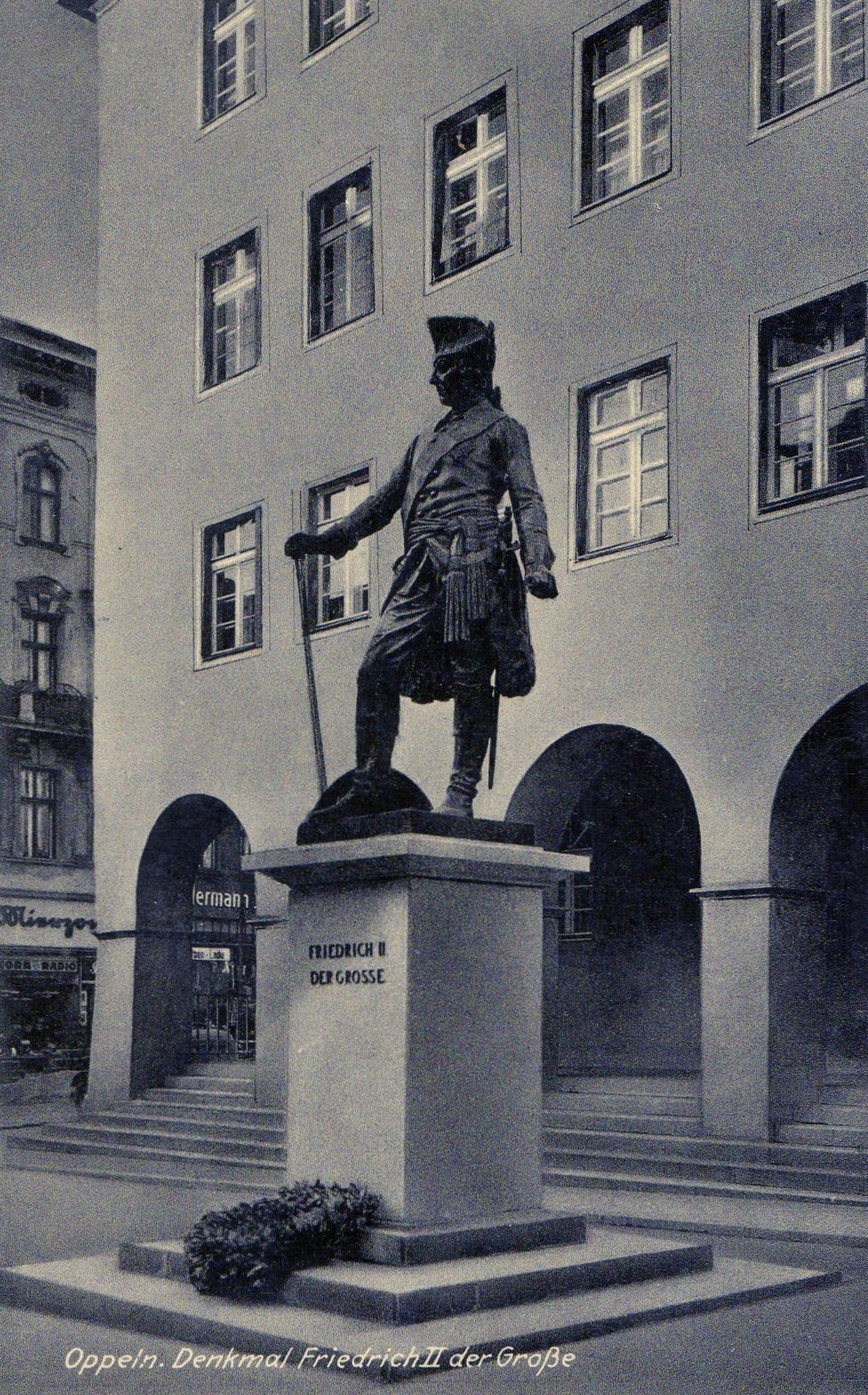 ehemaliges Denkmal von Friedrich dem Großen in Oppeln